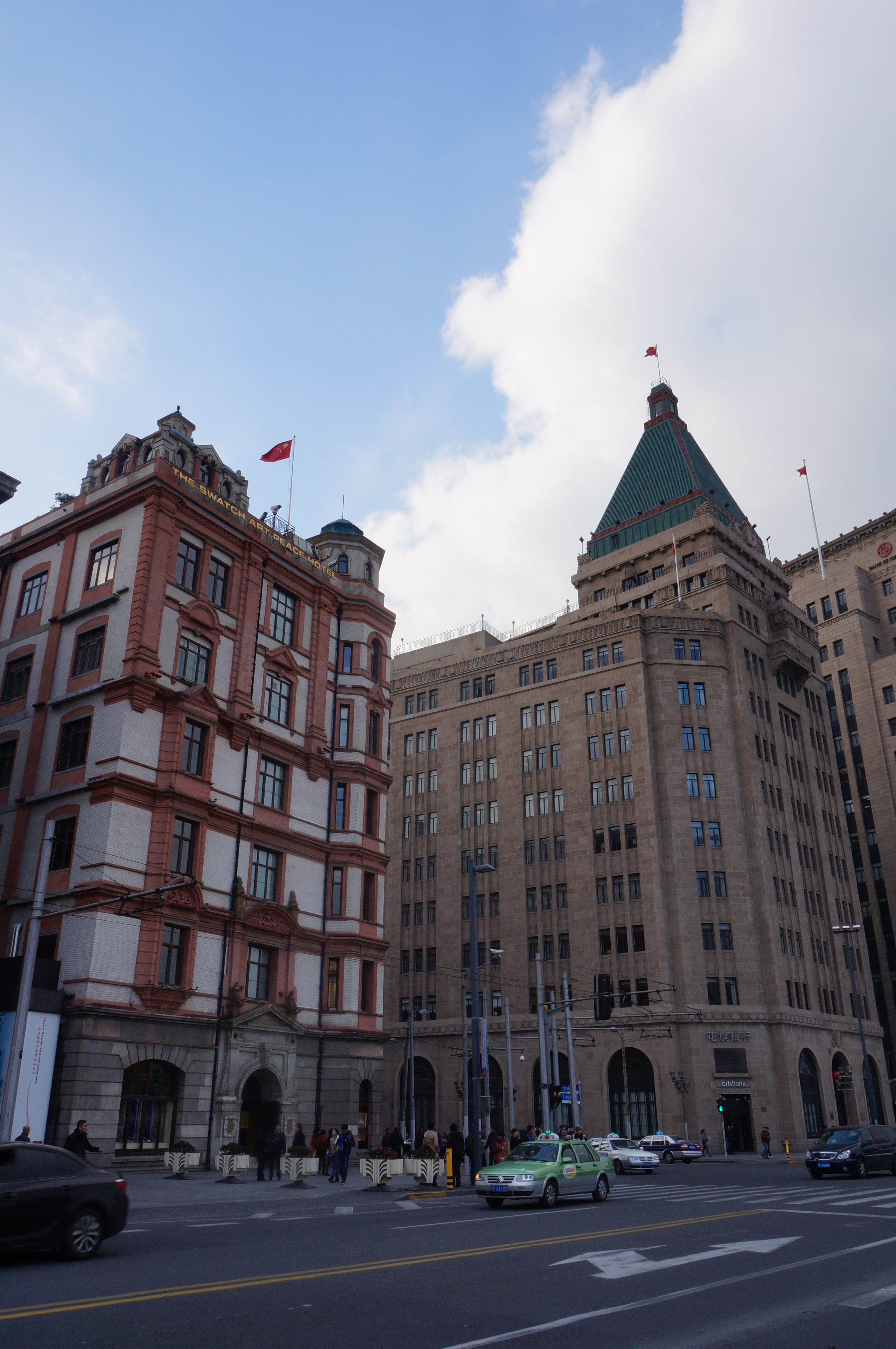 汇中饭店与沙逊大厦